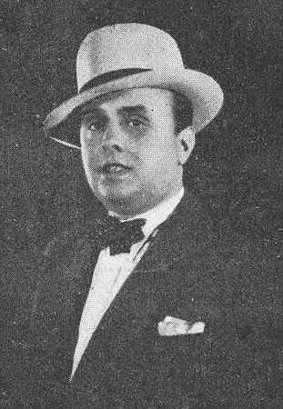 Alejandro Rodríguez Veiras, fotografía en Vida Gallega 1933